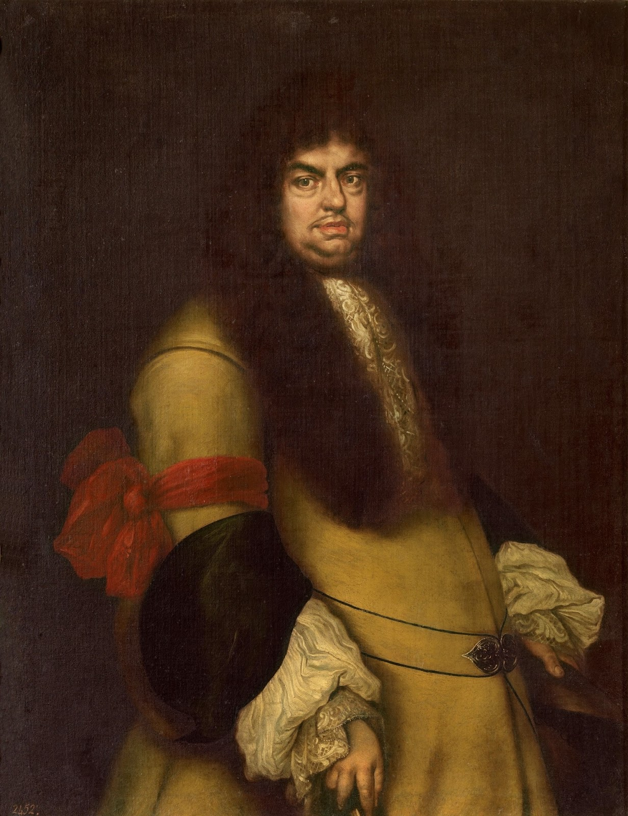 Retrato del aristócrata y militar español Guillén Ramón de Moncada y Portocarrero (1671-1727), que fue marqués de Aytona.